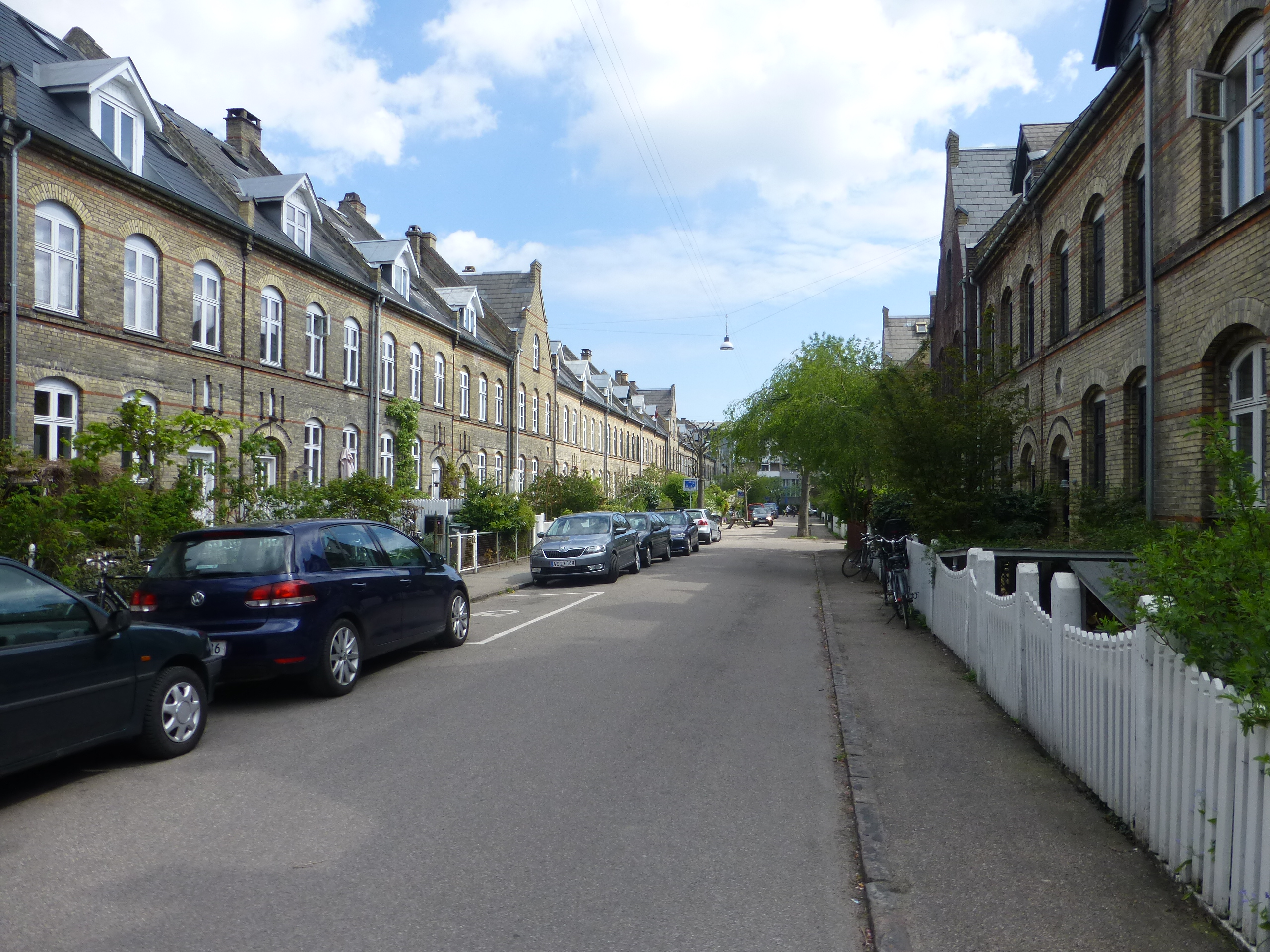 The street Berggreensgade in Østerbro in Copenhagen.